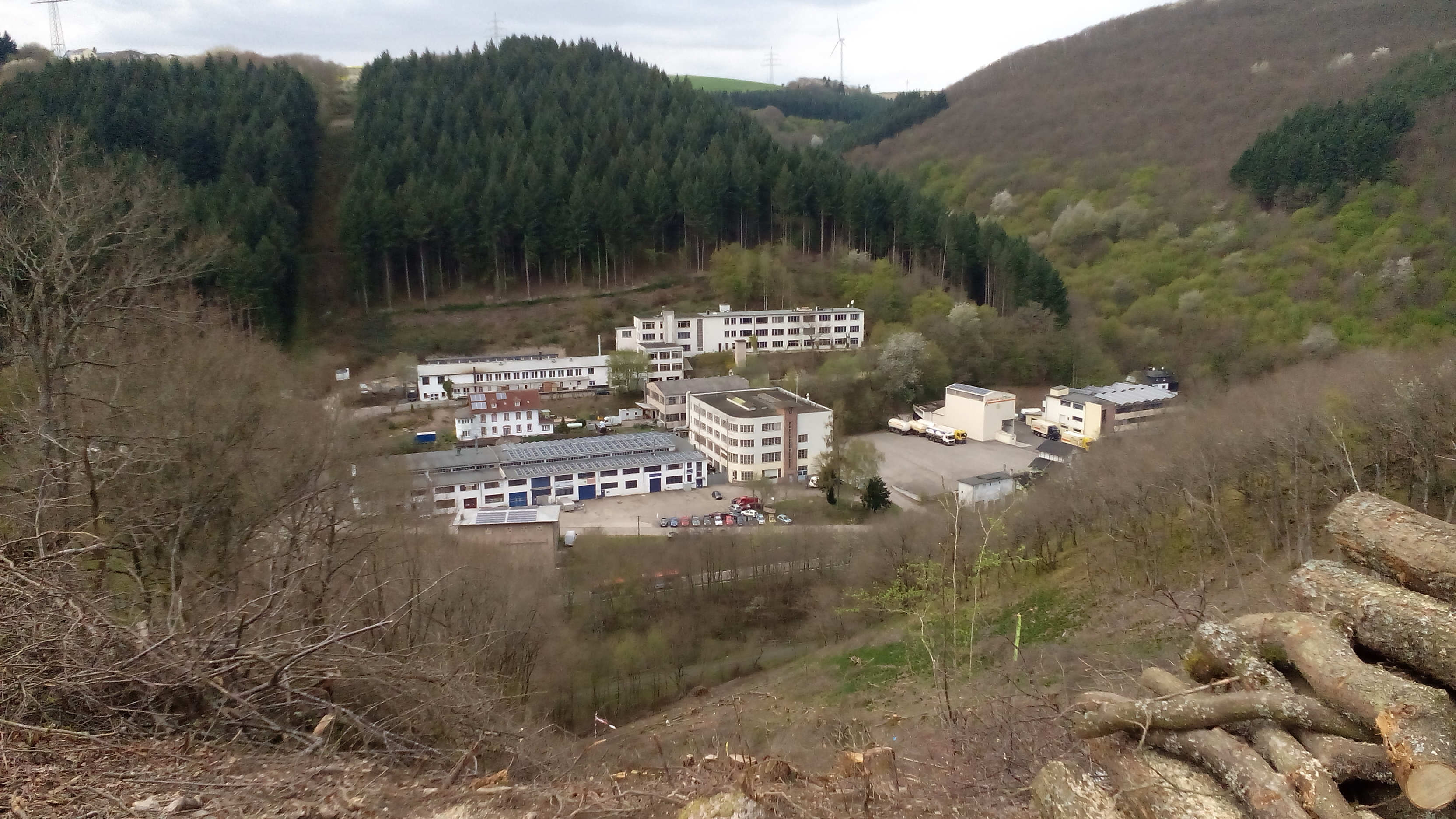 Blick von Osten auf die ehemaligen Produktionsstätten der Romika Juni 2014